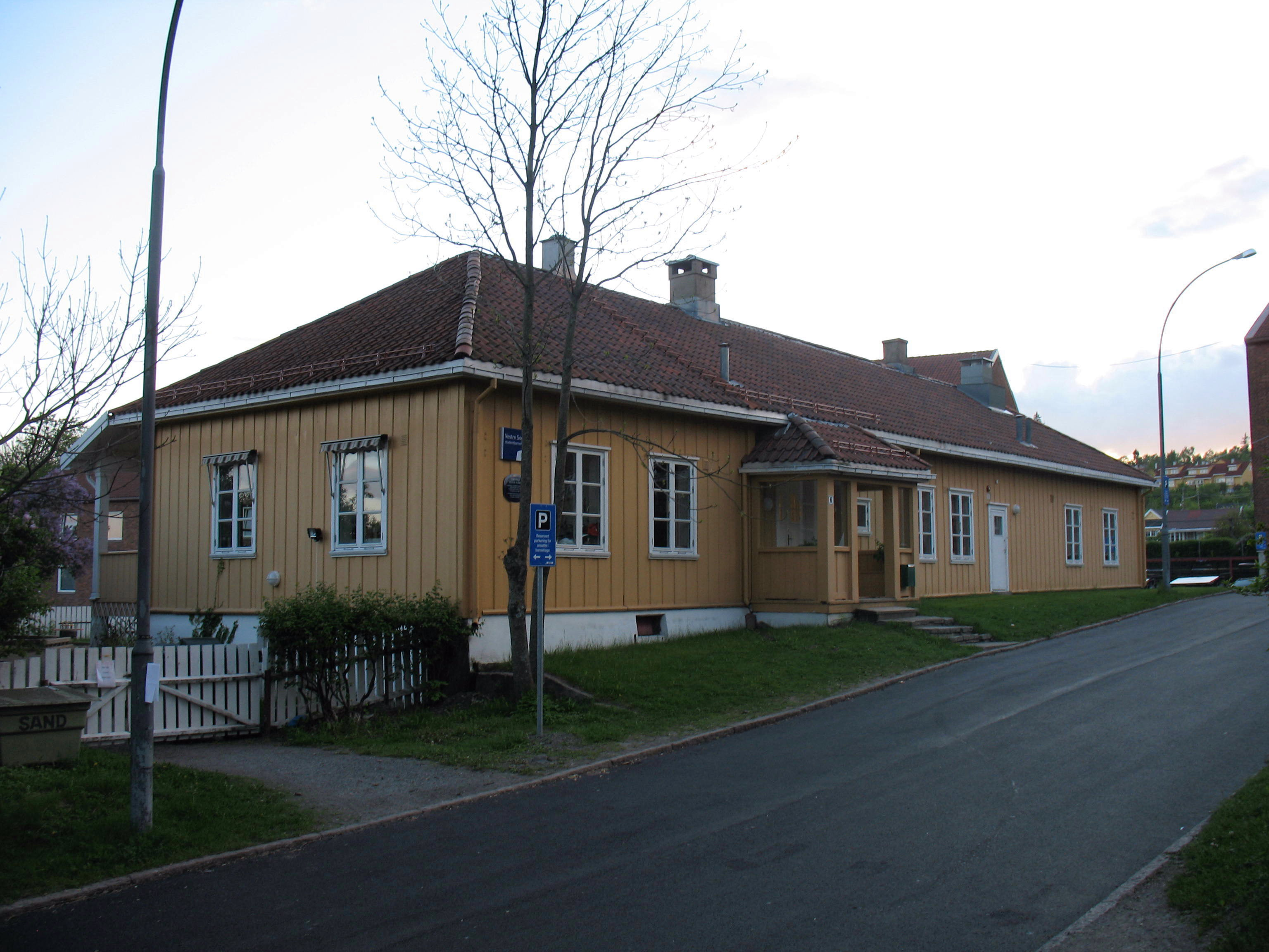 Hovedbygningen til Vestre Sogn gård